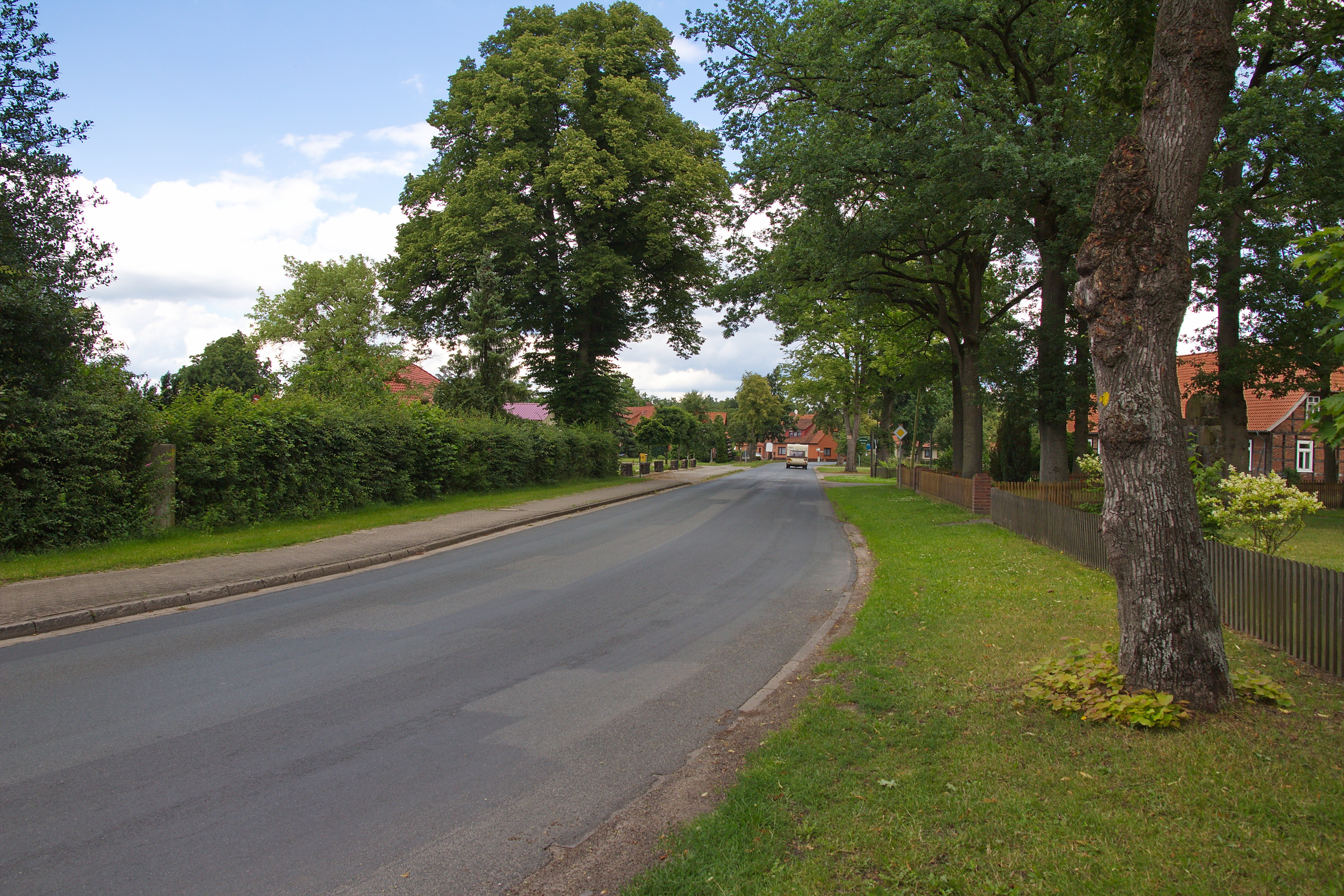 Ortsblick in Bierde (Böhme), Niedersachsen, Deutschland.